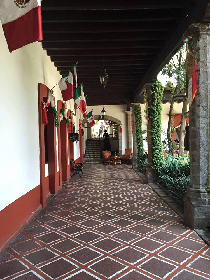 Vista desde la puerta de la entrada a la hacienda de San Angel Inn, a mano derecha se encuentra un patio con distintos tipos de plantas que sirven de decoración, se puede observar un diseño autentico colonial mexicano decorado con piso de cantera y vigas de madera en el techo.